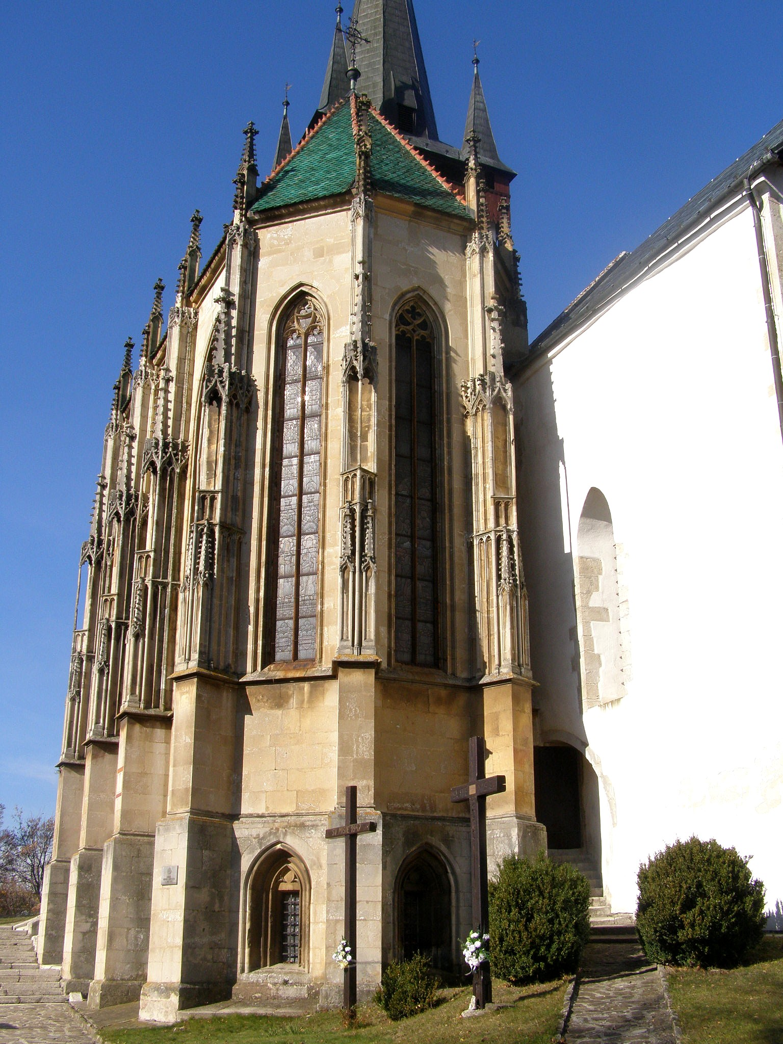 Kaplnka Zápoľských - celkový pohľad od juhovýchodu